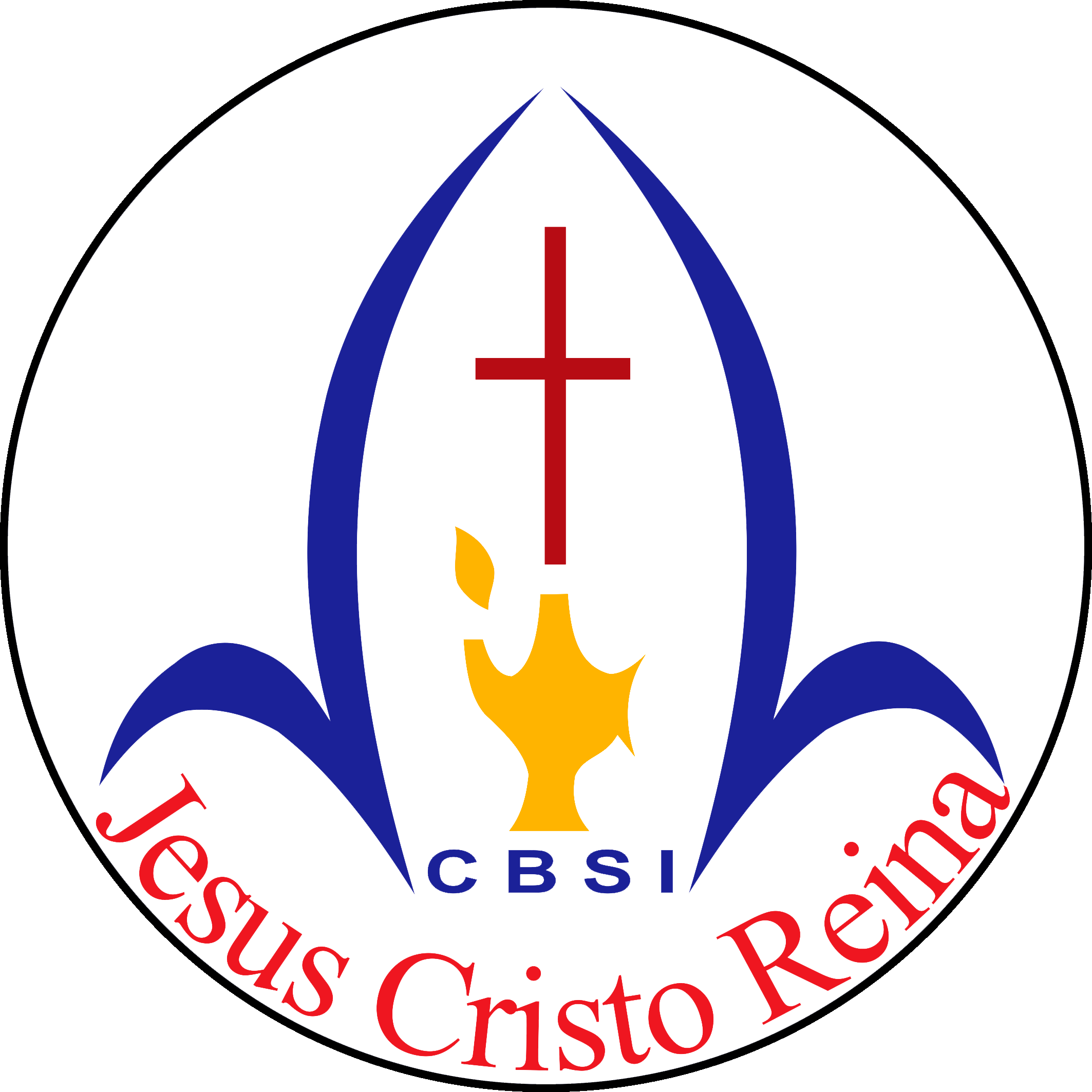 Logomarca atualizada da Comunidade Batista Shalom Internacional